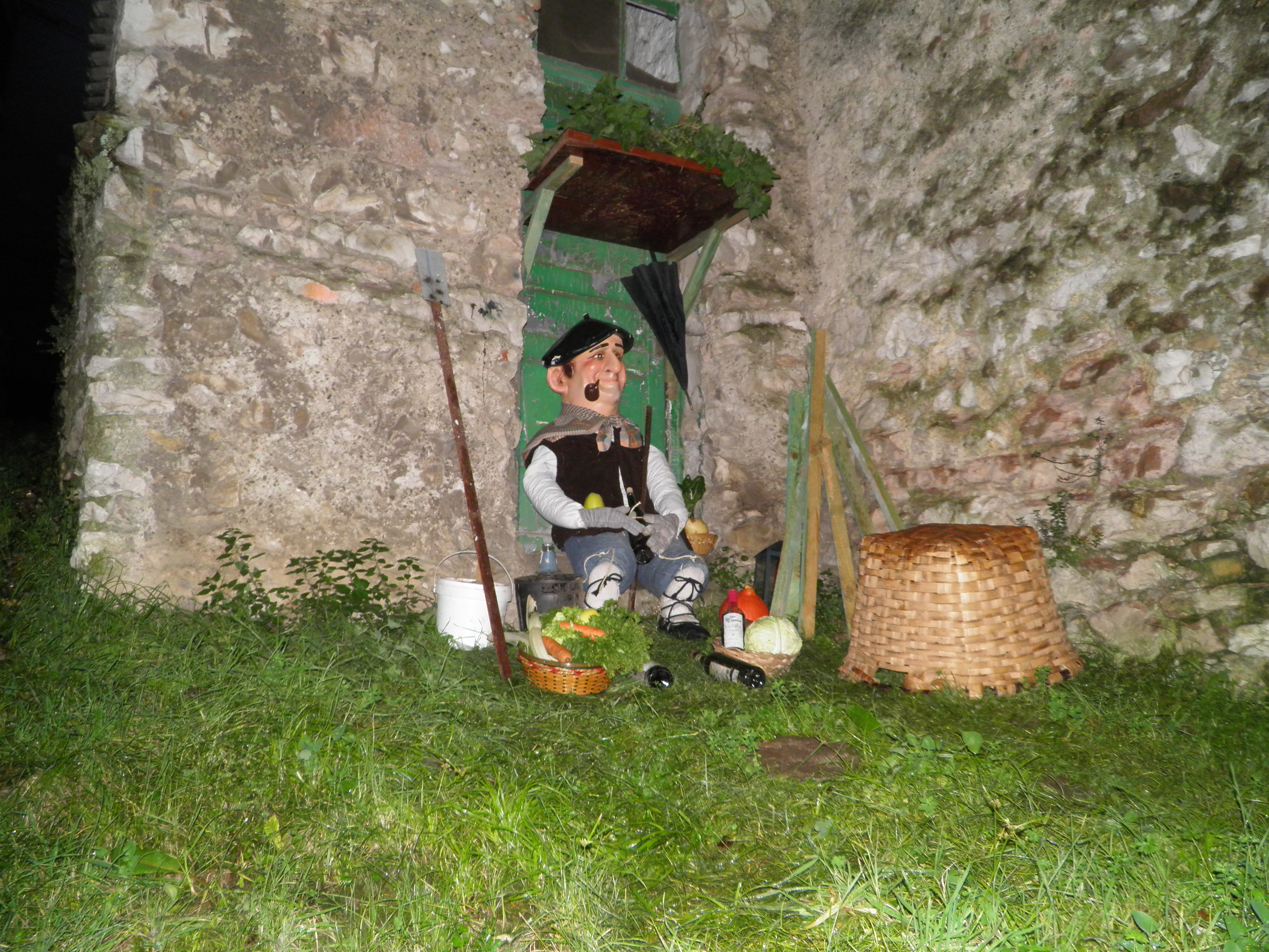 Olentzero Lezoko Kale Nagusian 2010